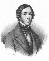 French indologist Auguste-Louis-Armand Loiseleur-Deslongchamps (1805-1840)